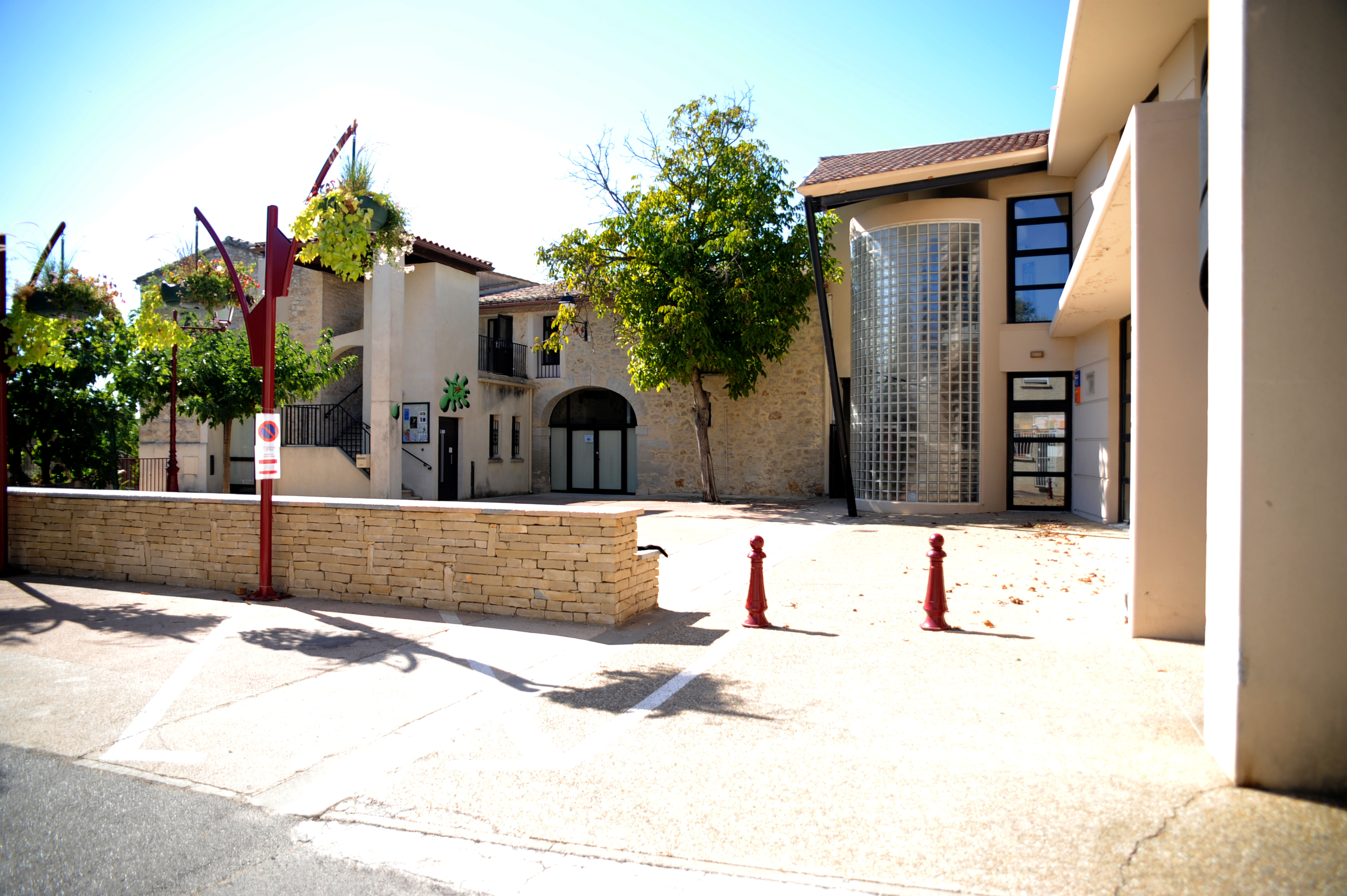 La médiathèque de Teyran (Hérault)